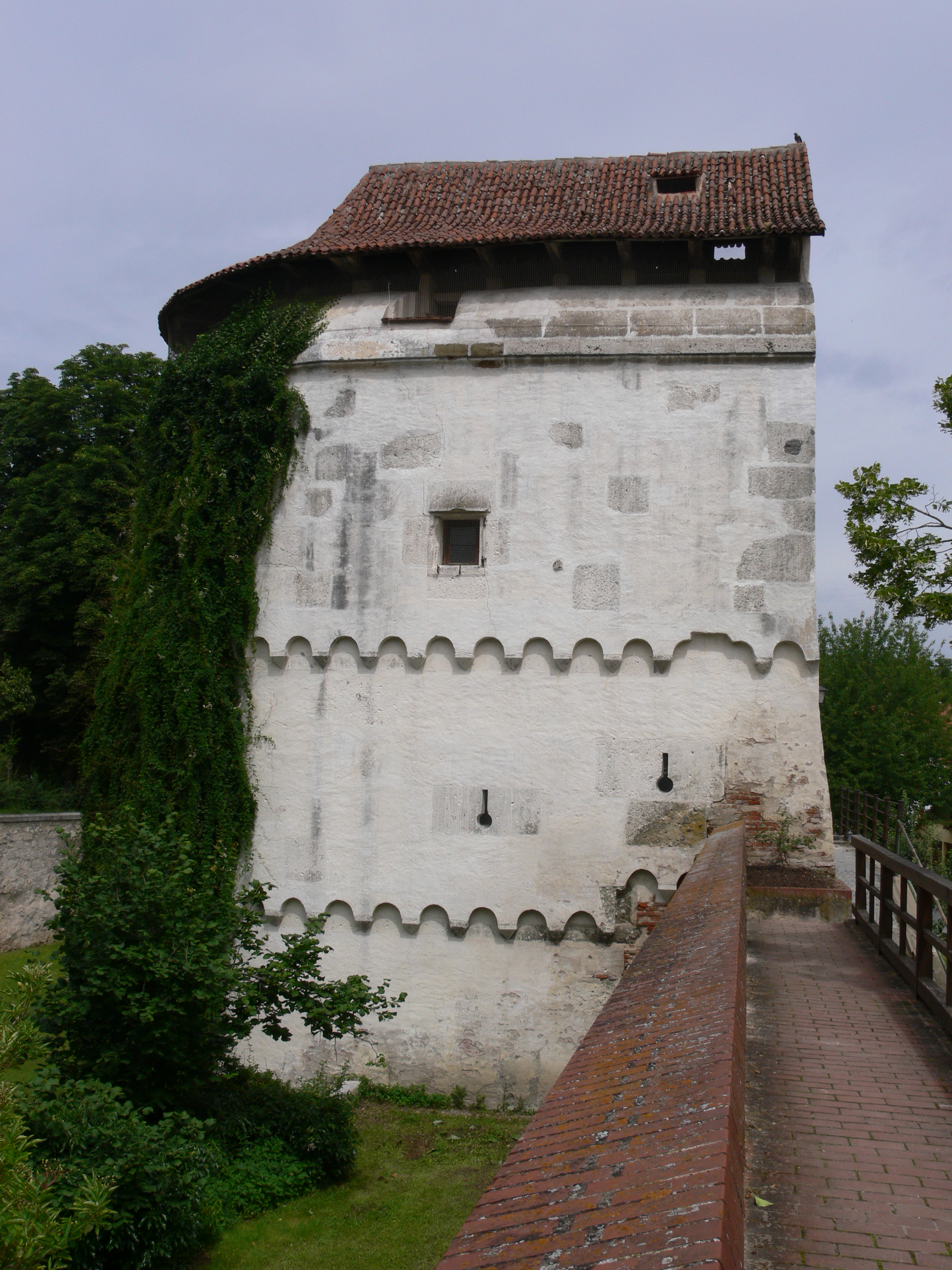 Nördlingen, Blick von der Stadtmauer Löwenturm (auch Pulverturm)